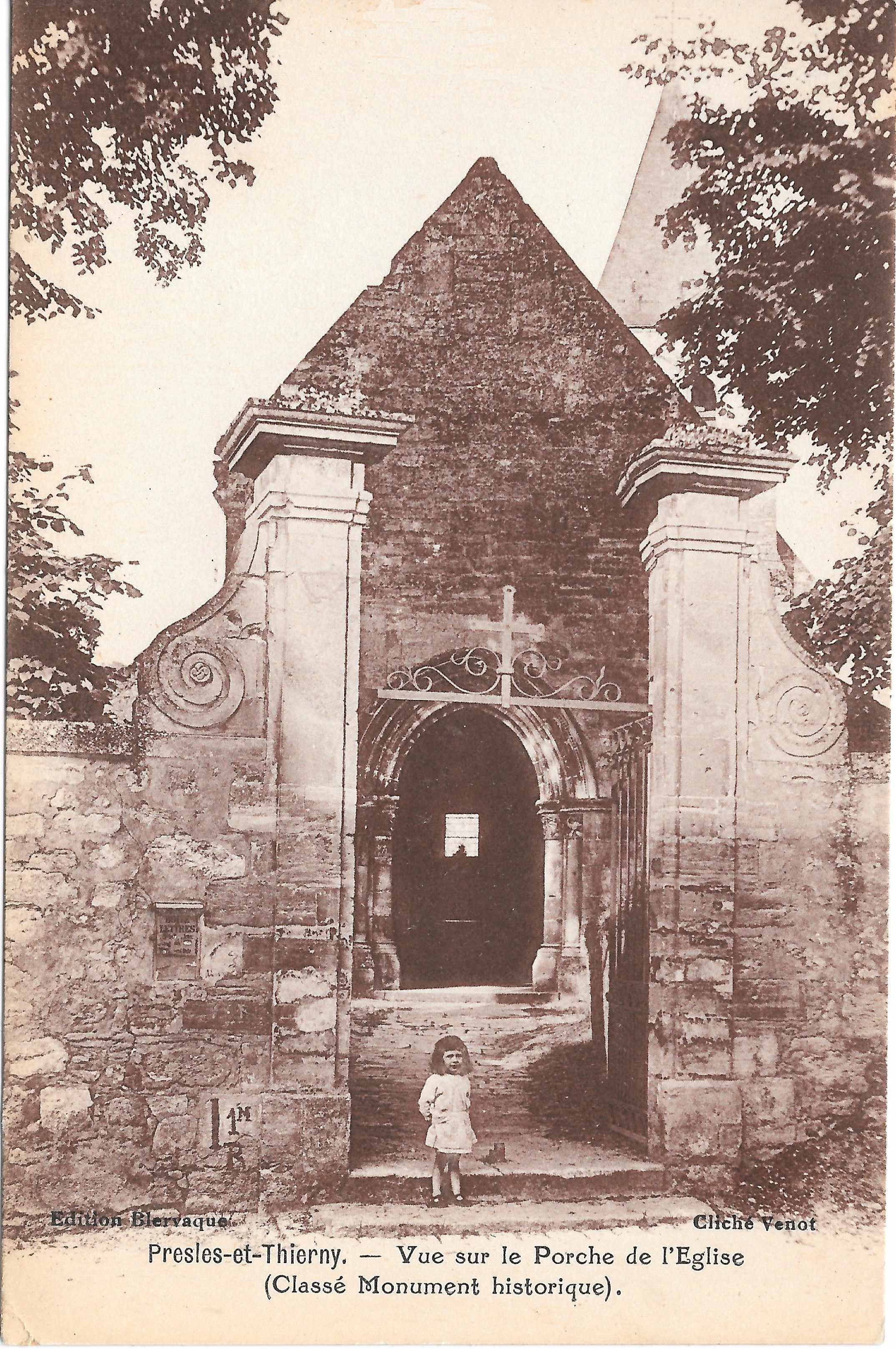 Le portail de l'église vers 1910.